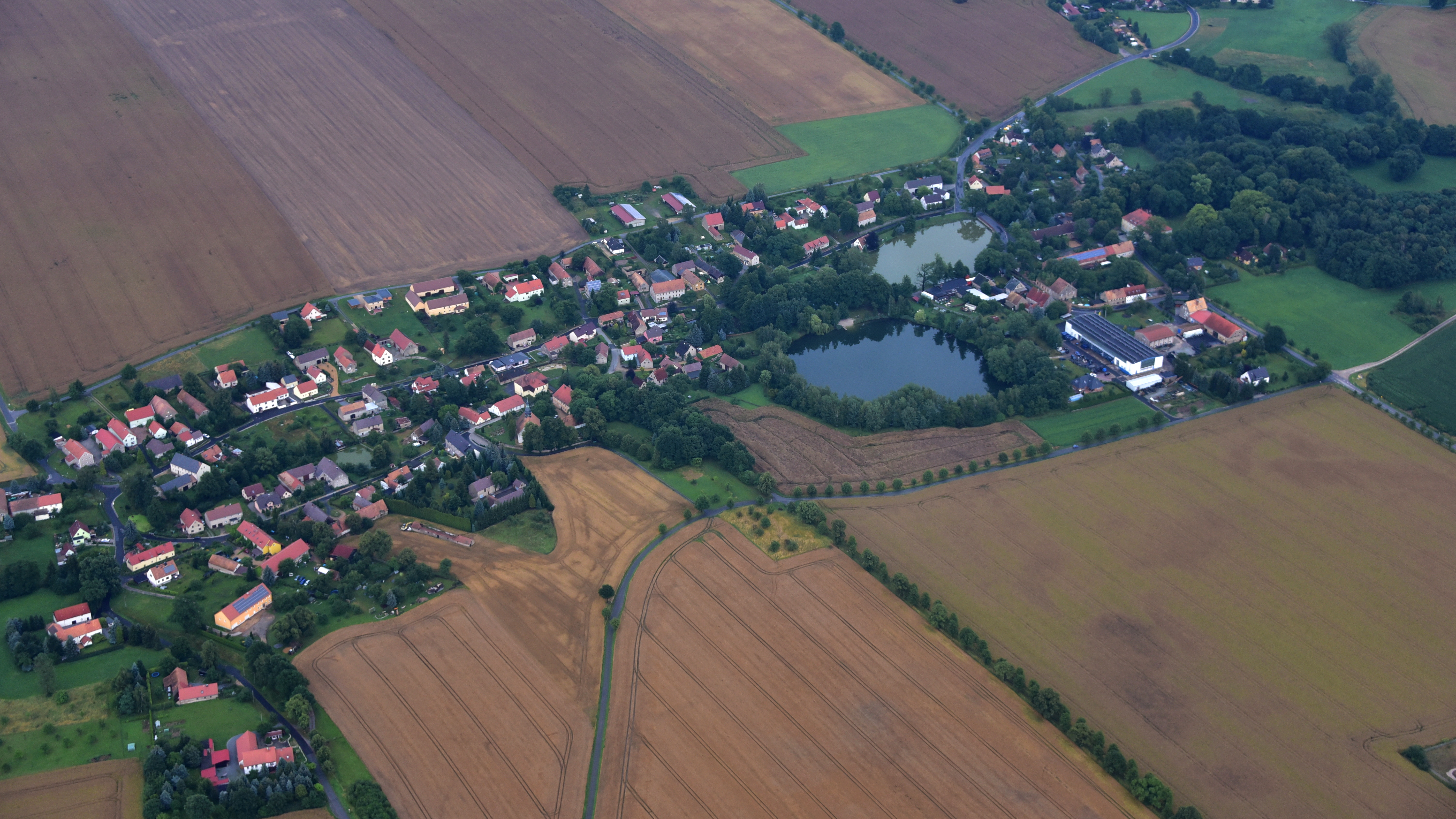 Buchholz (Vierkirchen), Luftaufnahme (2017) Hornjoserbsce: Powětrowy wobraz Křišowa (2017)